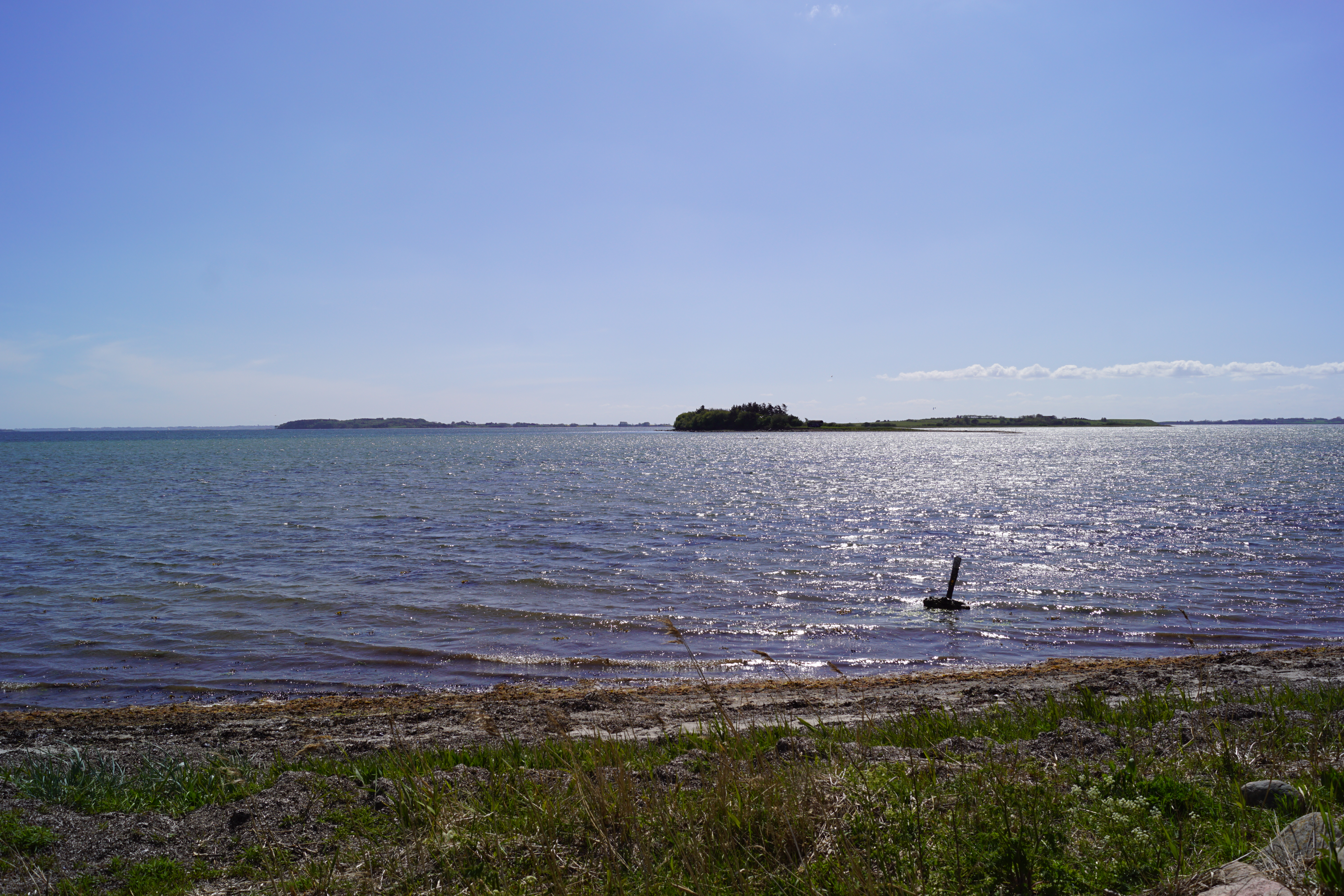 Græsholm og Svelmø ved Nakkebølle Fjord med Avarnakø i baggrunden